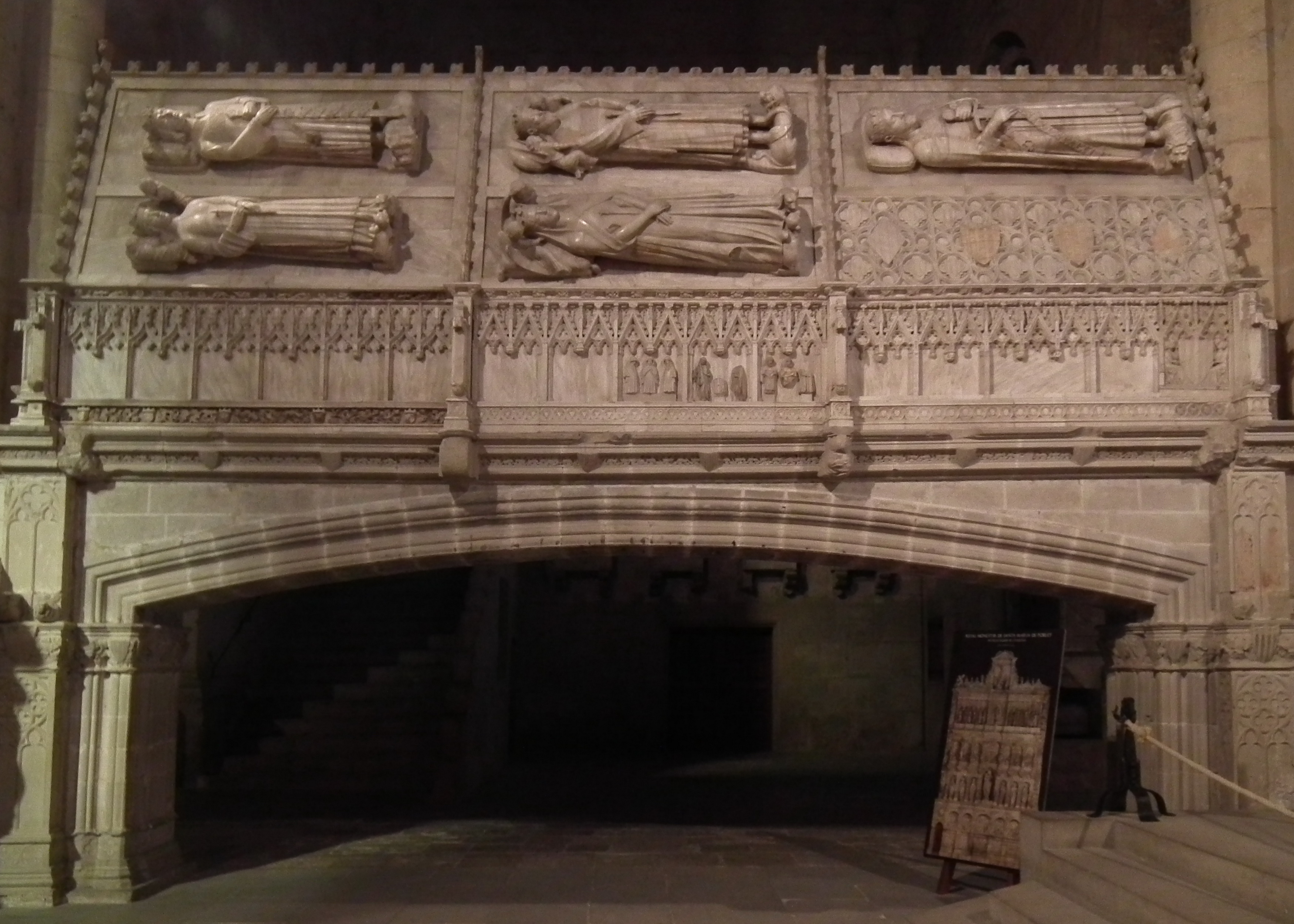 Reial Monestir de Poblet, Spain